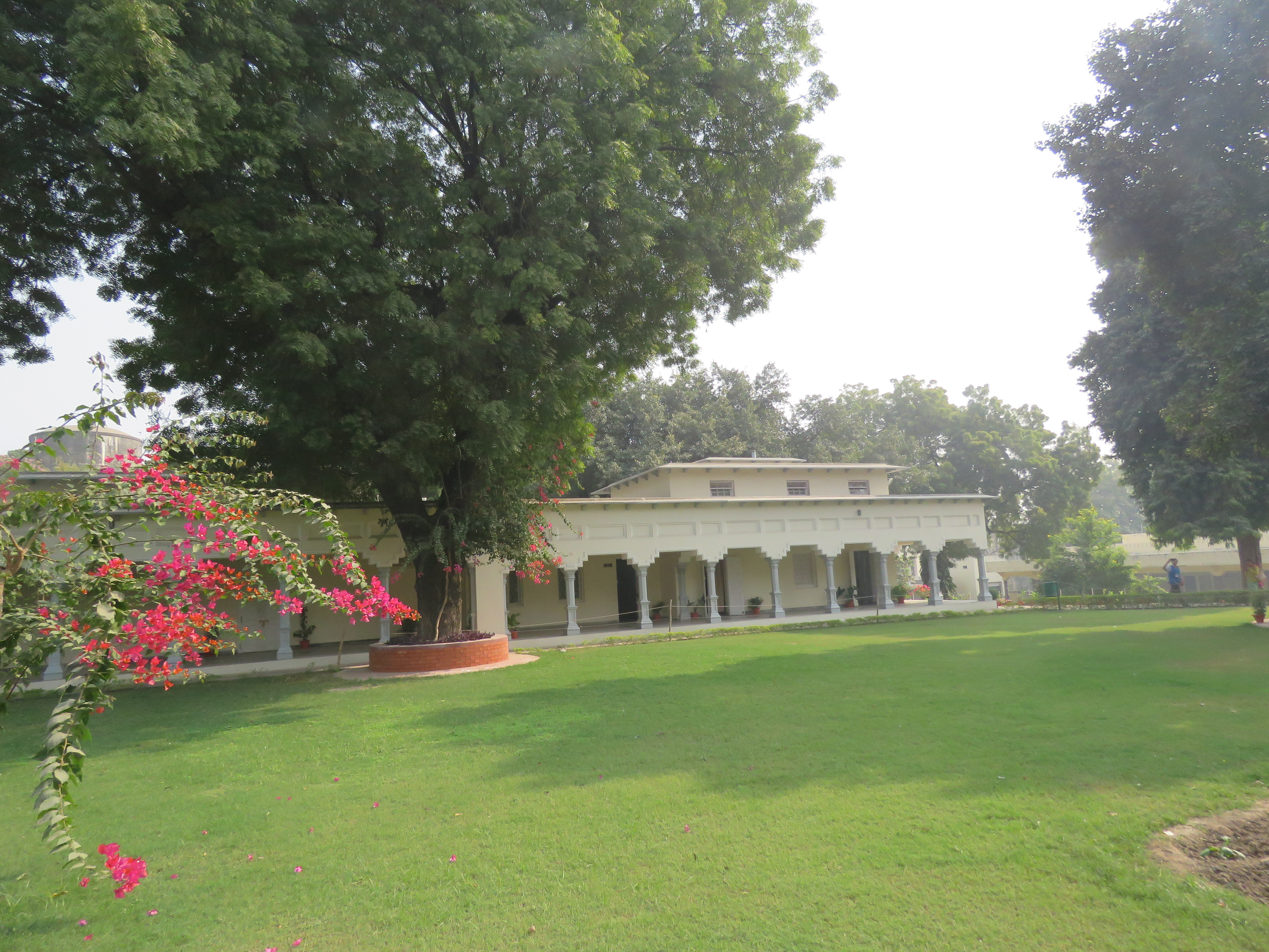 Anand Bhavan, Swaraj Bahvan - Photos during IRCTC 2017 - by Vinayaraj